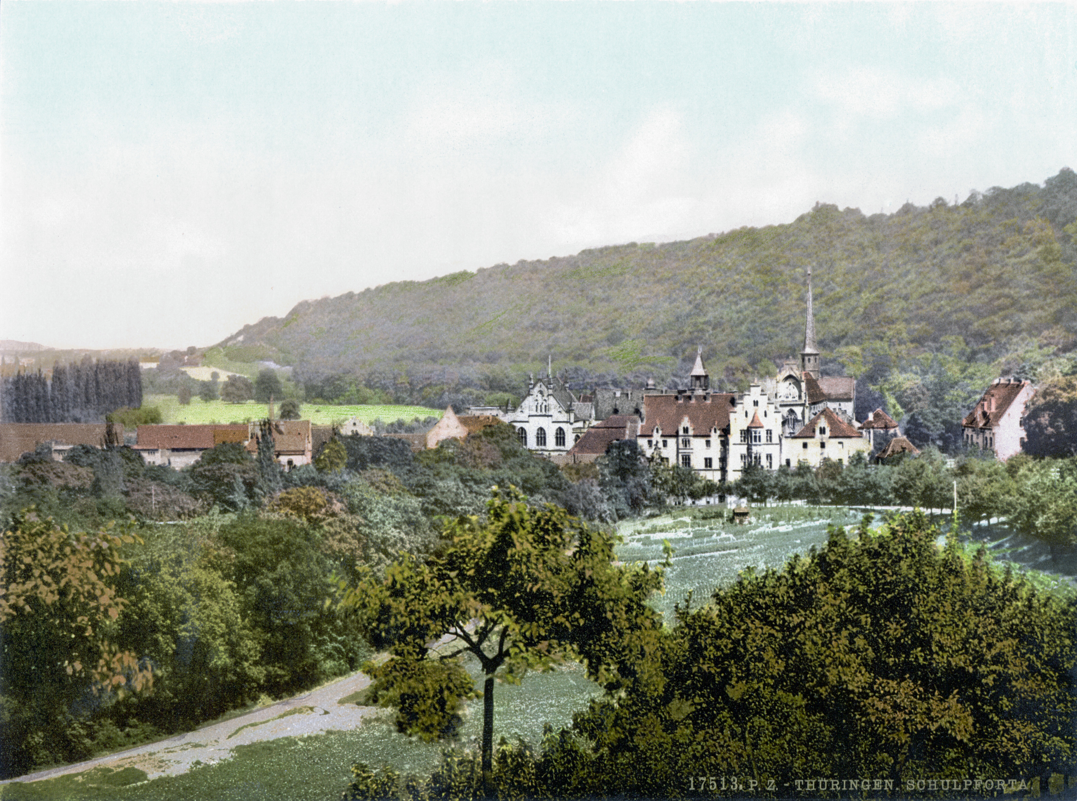 Schulpforta